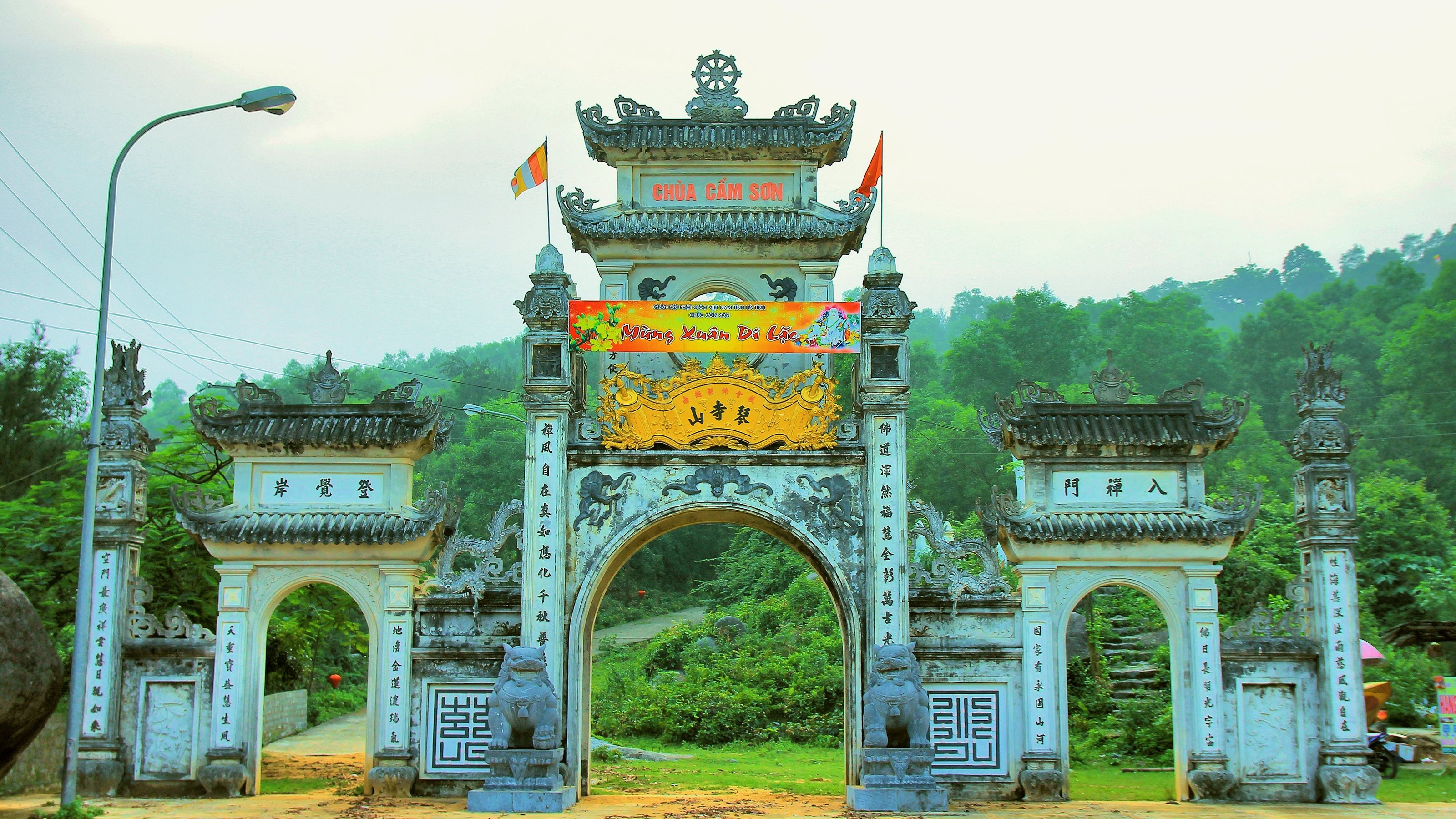 Chùa Cầm Sơn